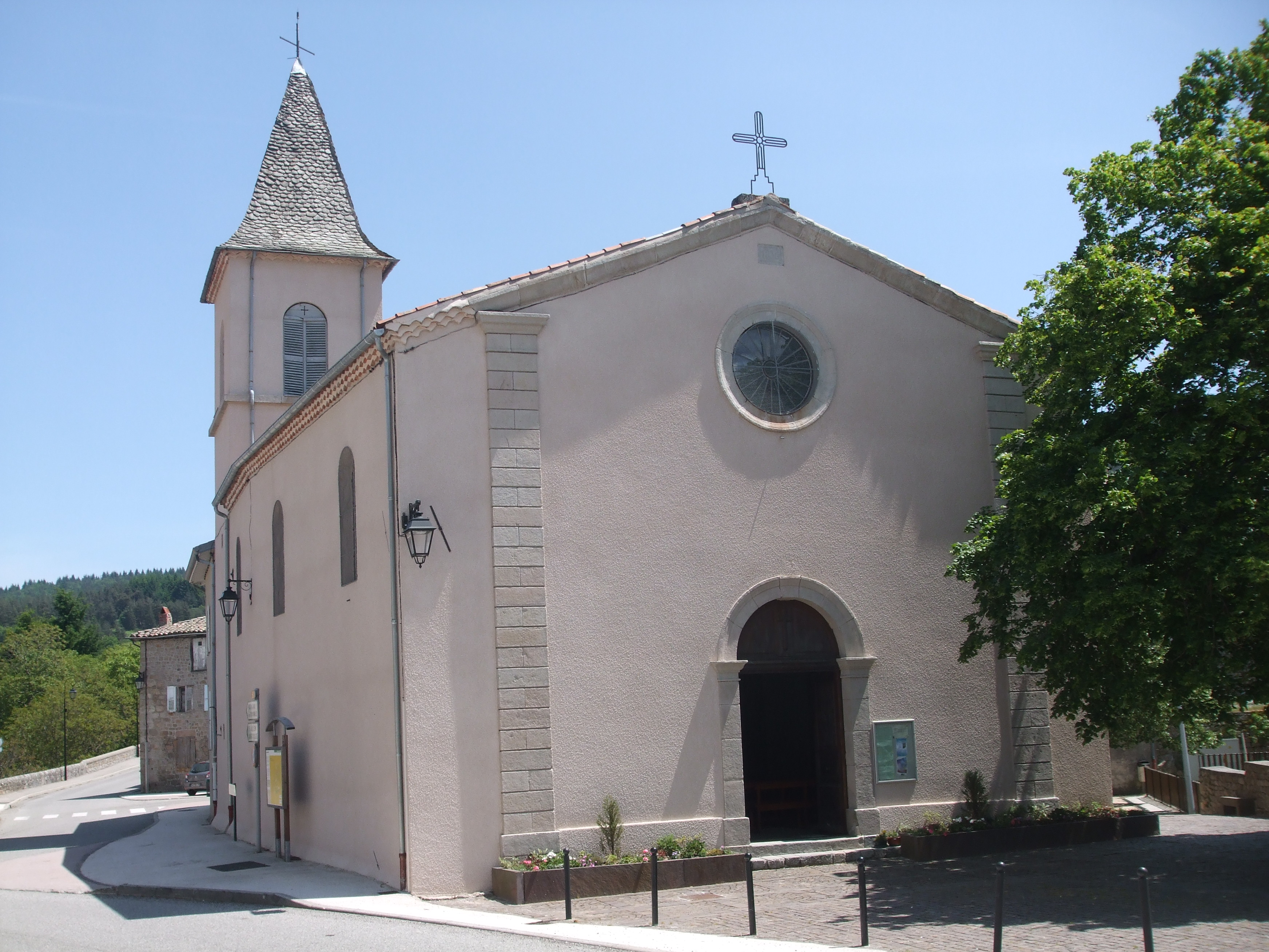 église Saint Jacques le Majeur